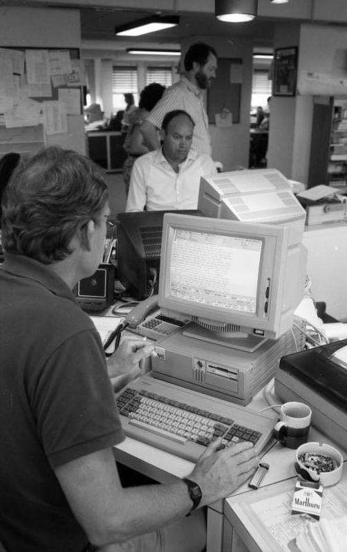 Juni 1988 Bonn, Nachrichtenagentur Reuters